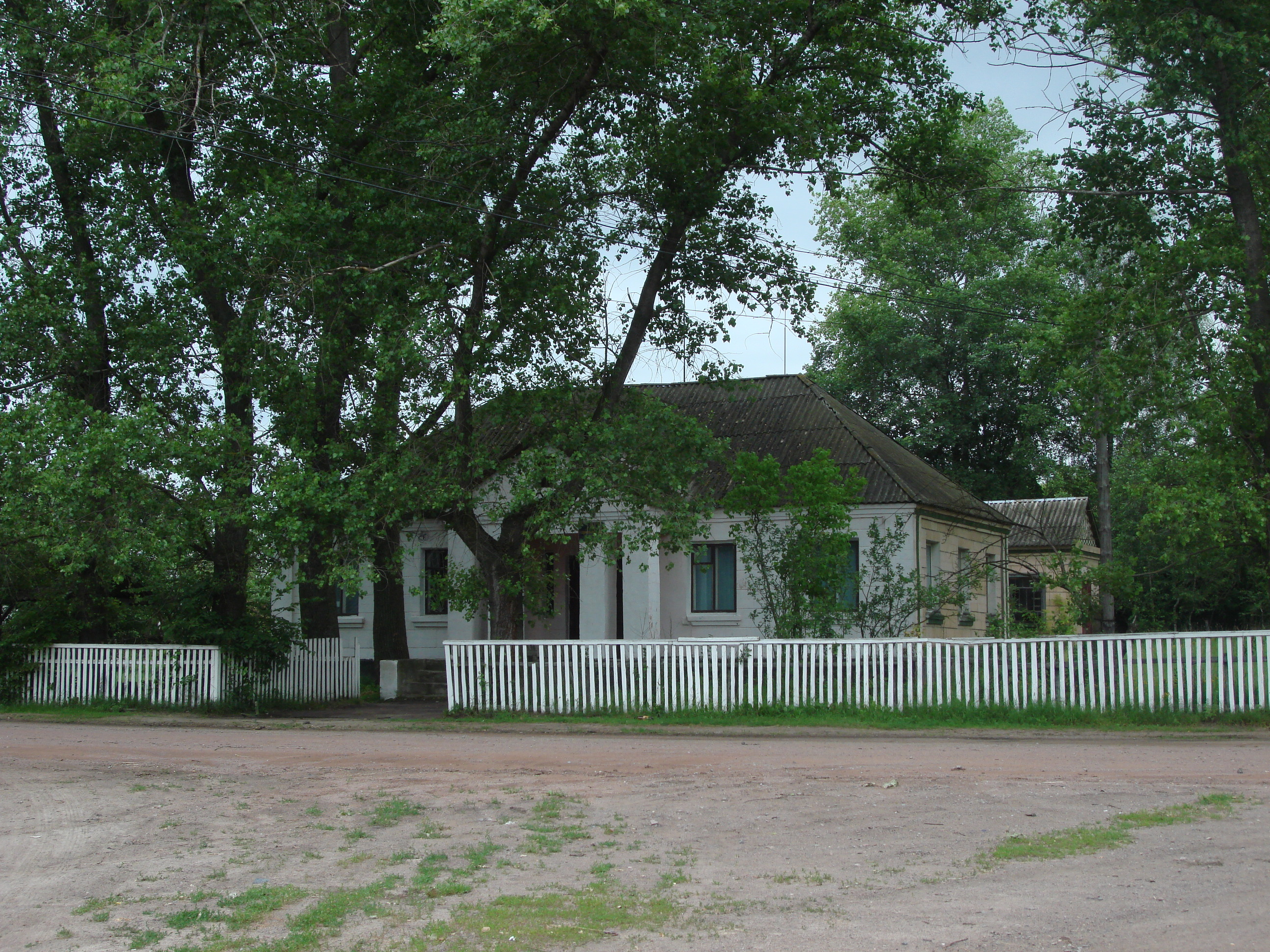 Клуб__с._Сингаї_Коростенського_району